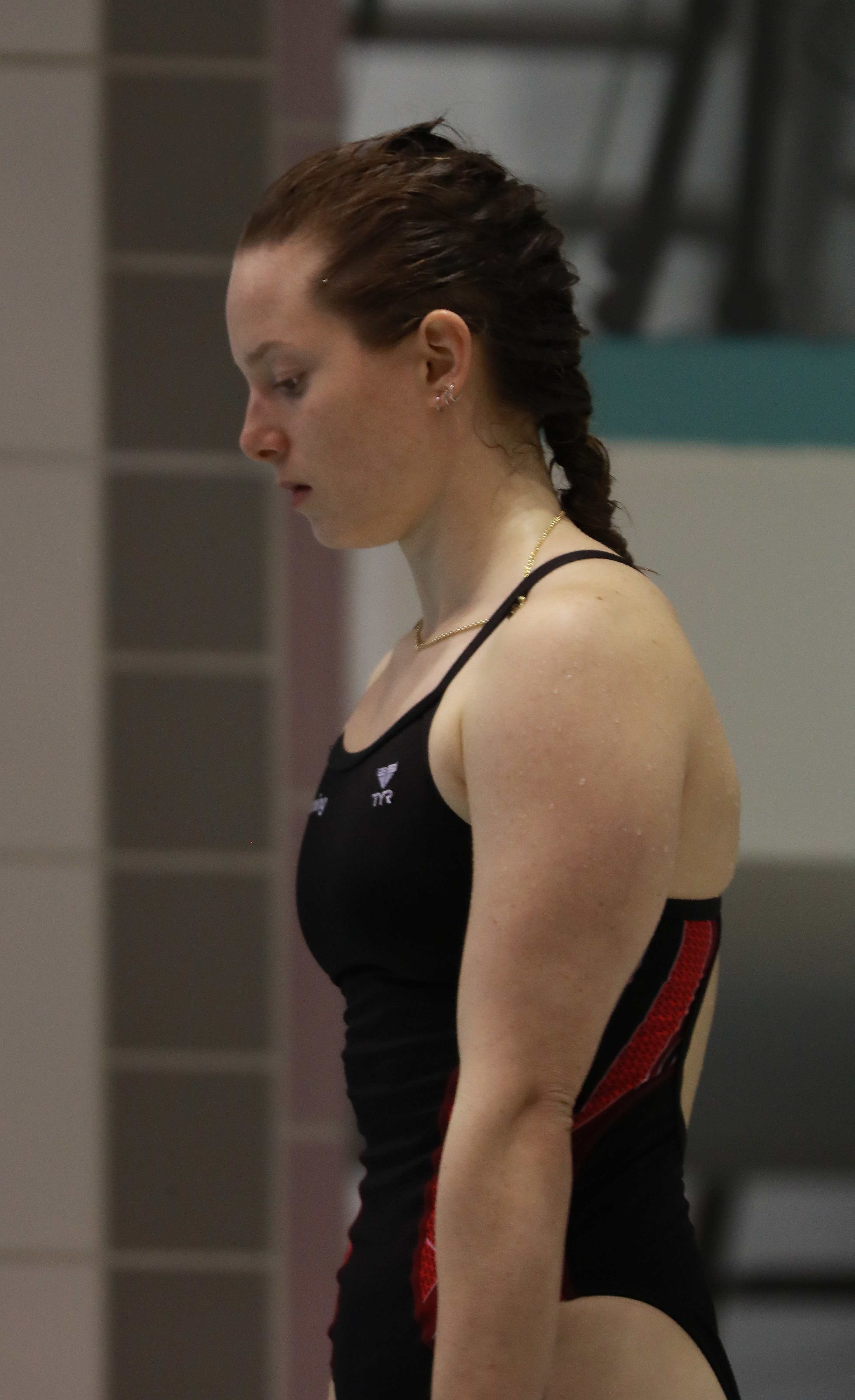 3m weiblich Halbfinale Sprung 2 bei den Internationalen Deutschen Hallenmeisterschaften im Wasserspringen Offene Klassen und Junioren. Abgebildet: Jessica Favre.